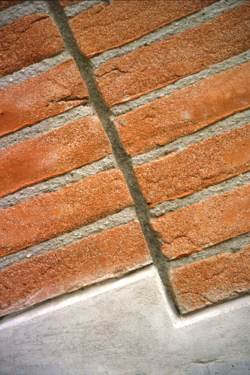 Casa a Manno - arch. Mario Botta 1987-90